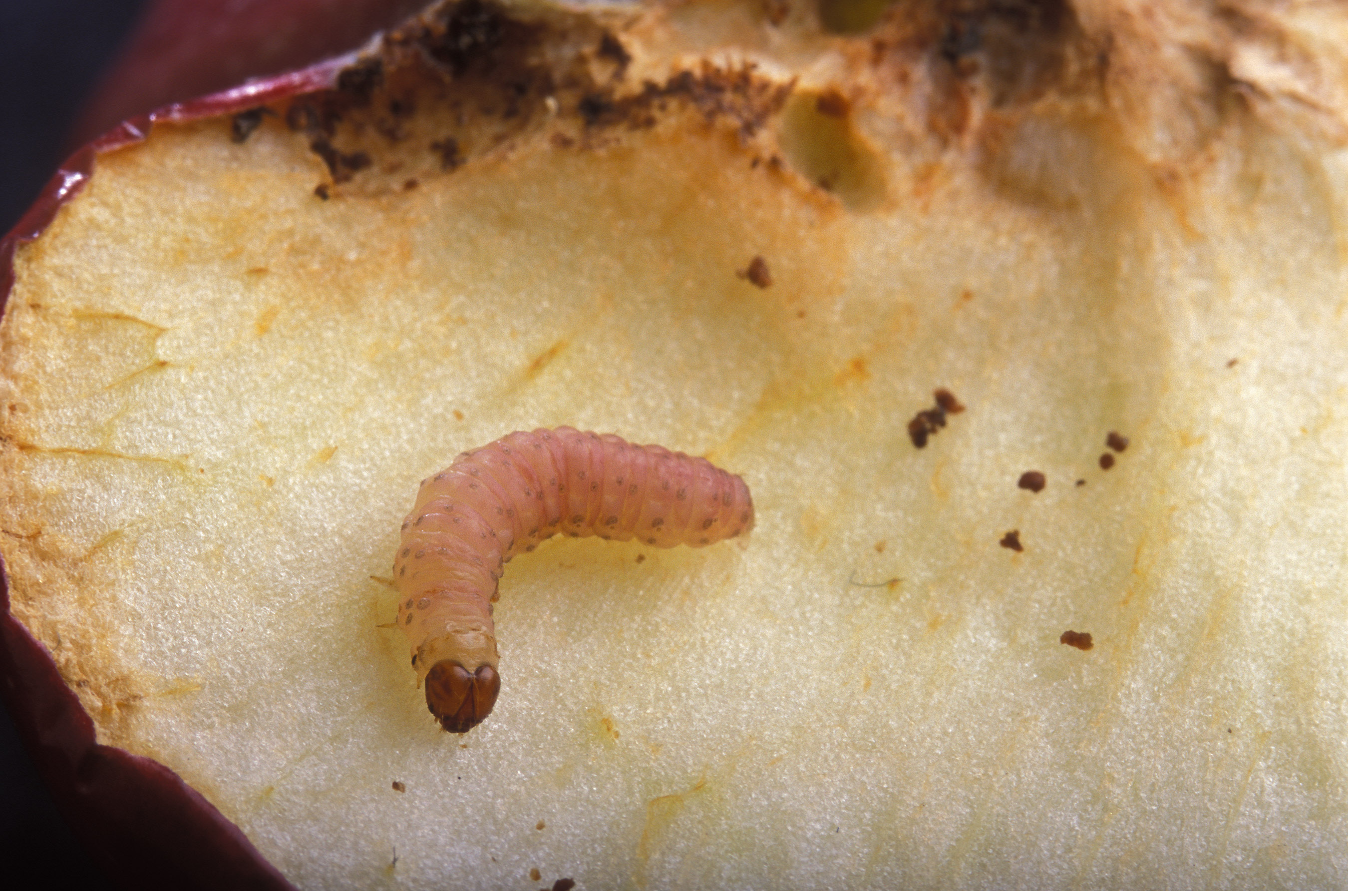 Cydia pomonella larva